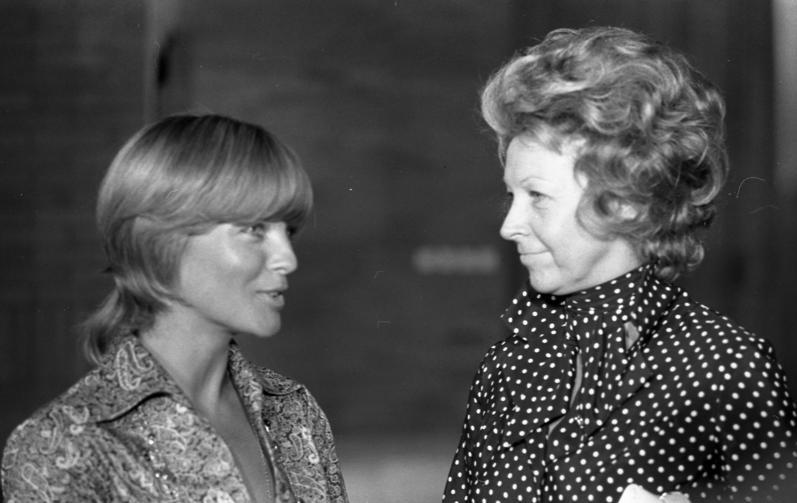 Bundeskanzler Willy Brandt empfängt Filmschauspieler